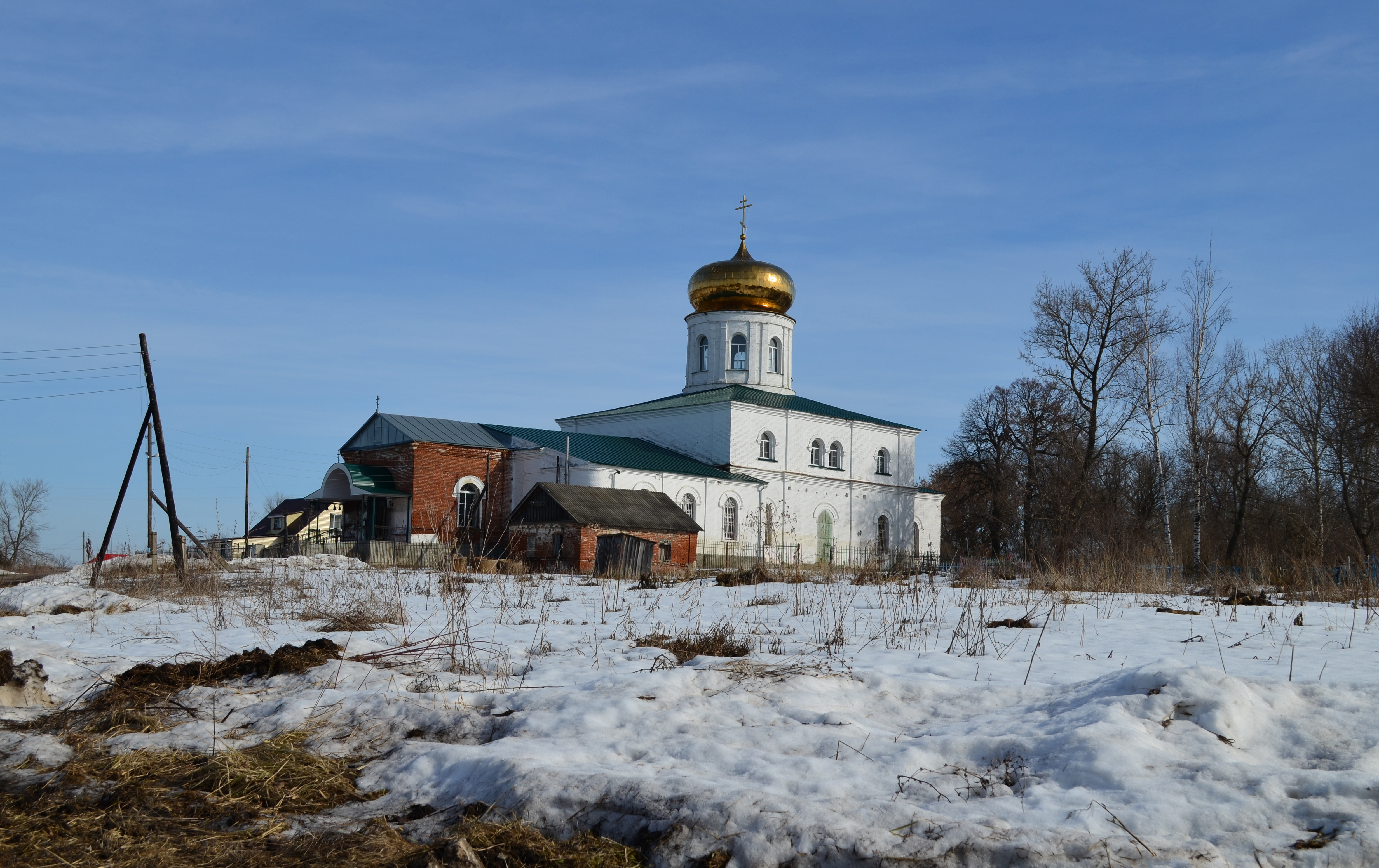 Рязанская область,Кораблинский район,село Незнаново.Церковь Параскевы Пятницы.1856 г.